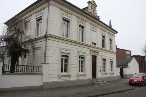 Paulstr. 50 in Düren-Merken